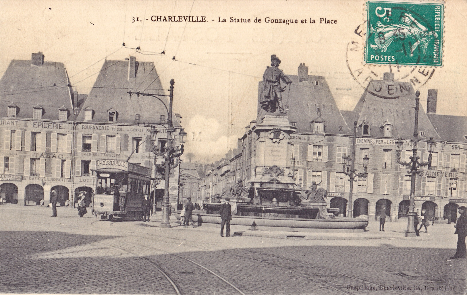 Carte postale ancienne éditée par Gaspillage, 34 Grande-Rue à Charleville, n°31 :w:fr:Charleville - La statue de Gonzague et la Place